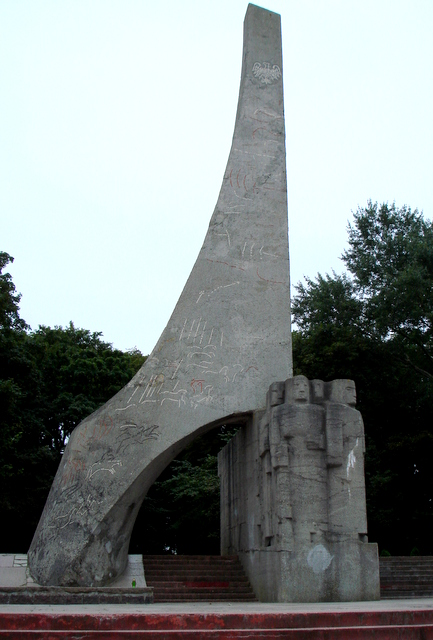 Pomnik Zaślubin Polski z Morzem w Kołobrzegu